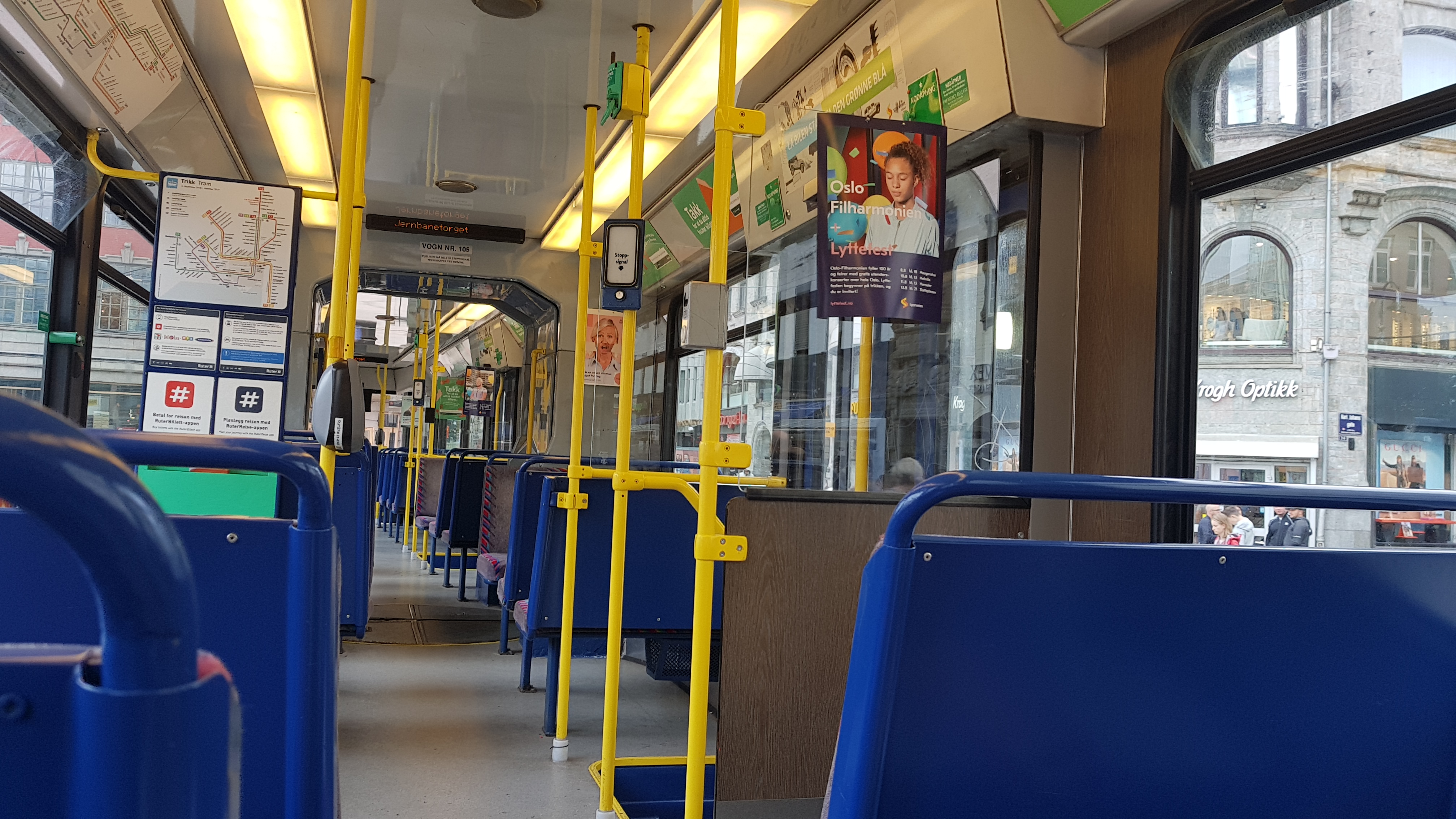 SL79-raitiovaunun 105 matkustamo Oslossa